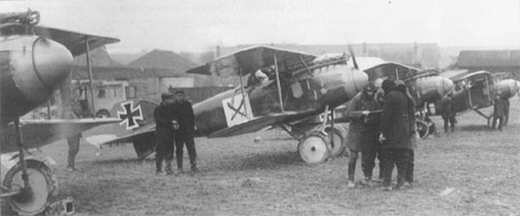 Jasta 9 at Leffincourt, 25 February 1917